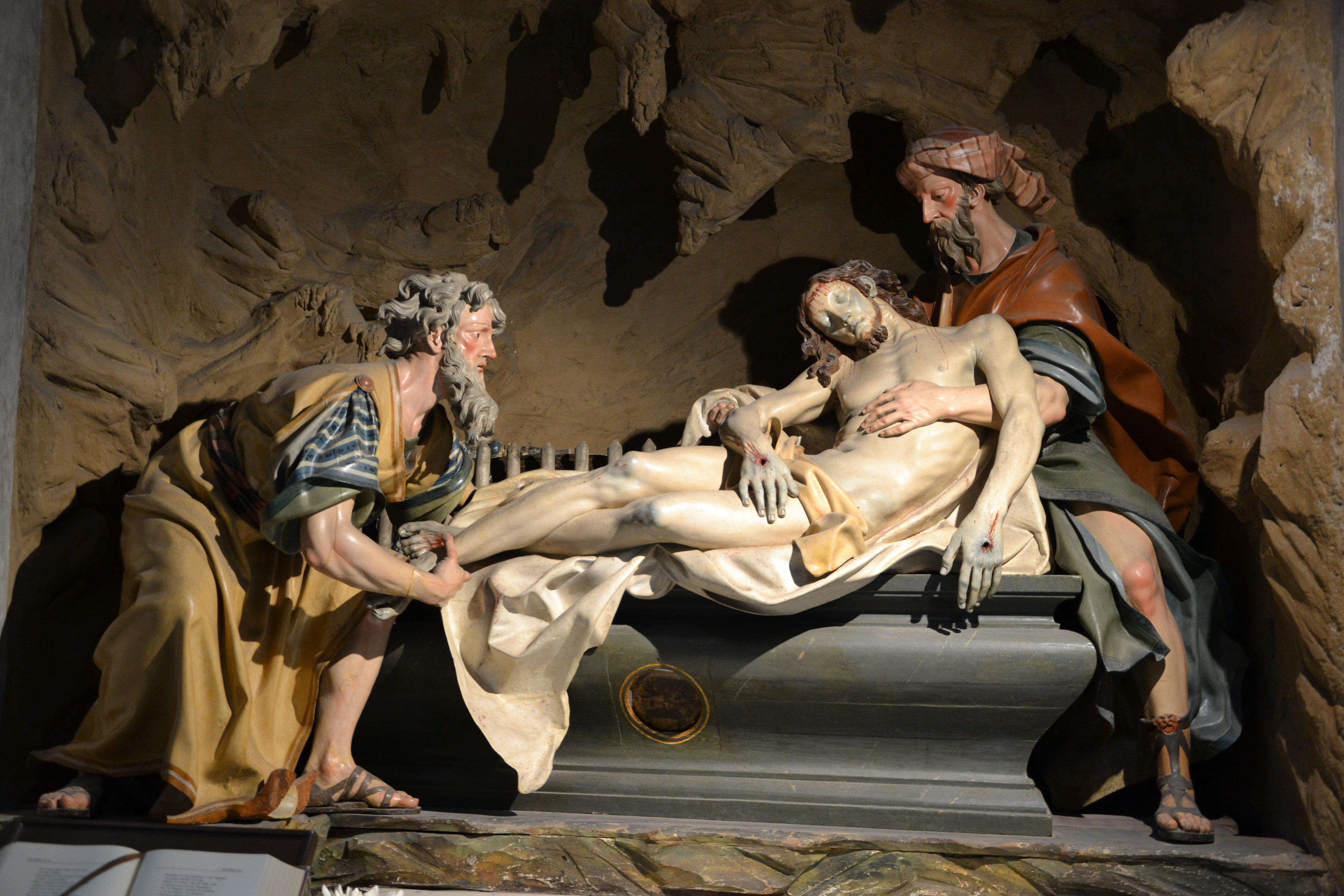 San Matteo church, Genoa, Ancient Roman relief in facade, allegory of autumn